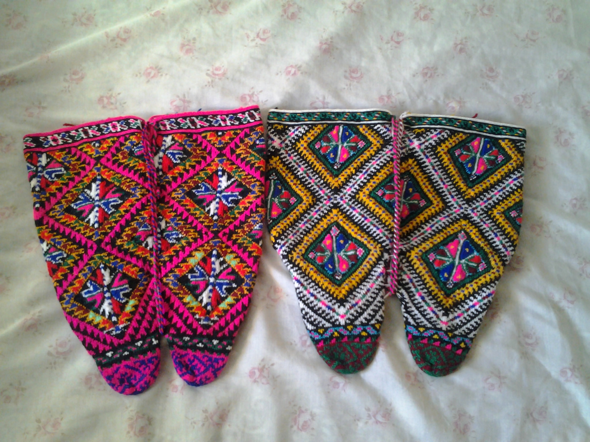 Corapet jane pjese e veshjes popullore e grave dhe nuseve te rajonit te Kukesit.